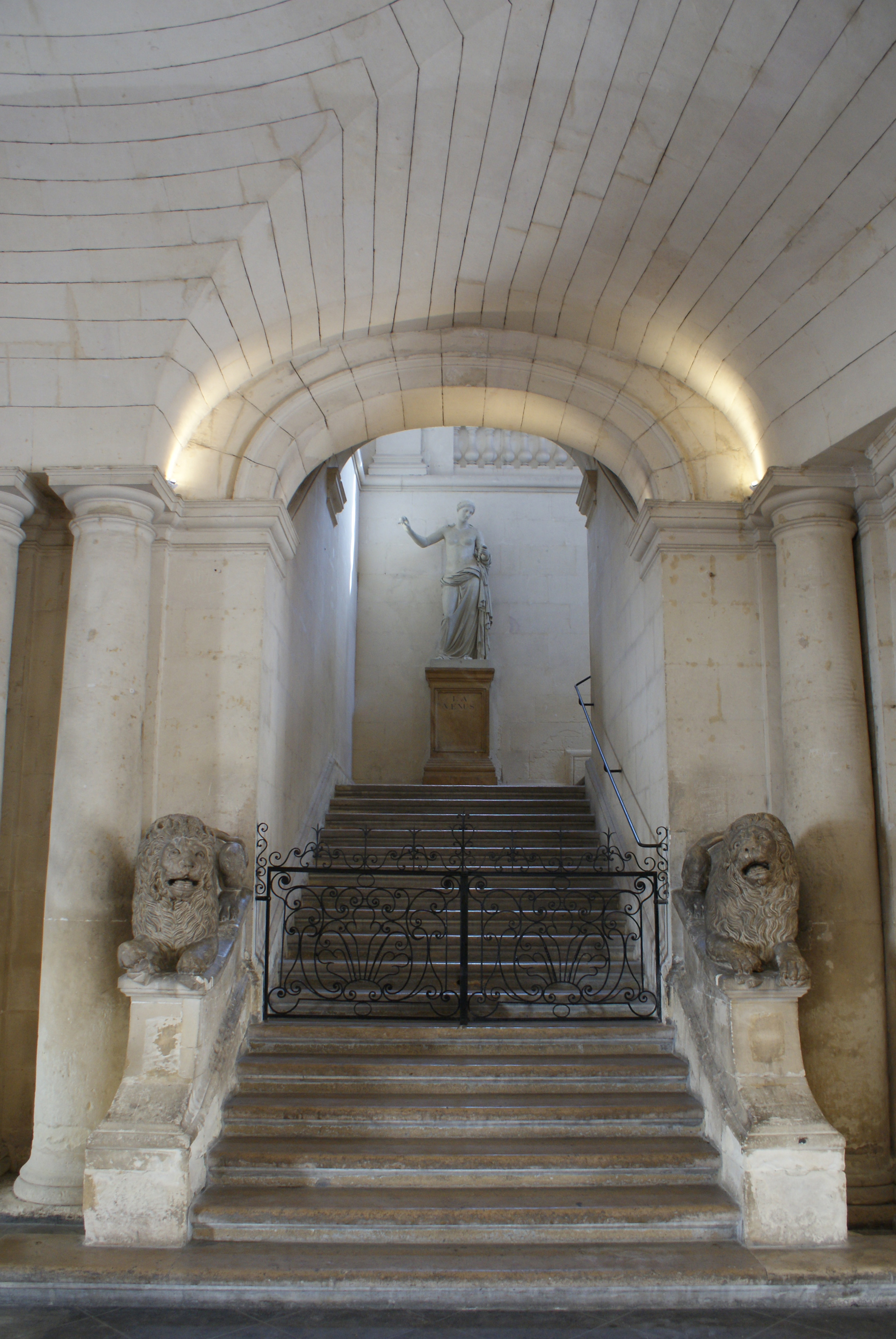 Copie de la Vénus d'Arles modifiée par François Girardon, en haut de l'escalier d'honneur donnant sur le hall d'entrée de l'hôtel de ville d'Arles. L'original est au Louvre. Les lions sont l'œuvre de Jean Dedieu